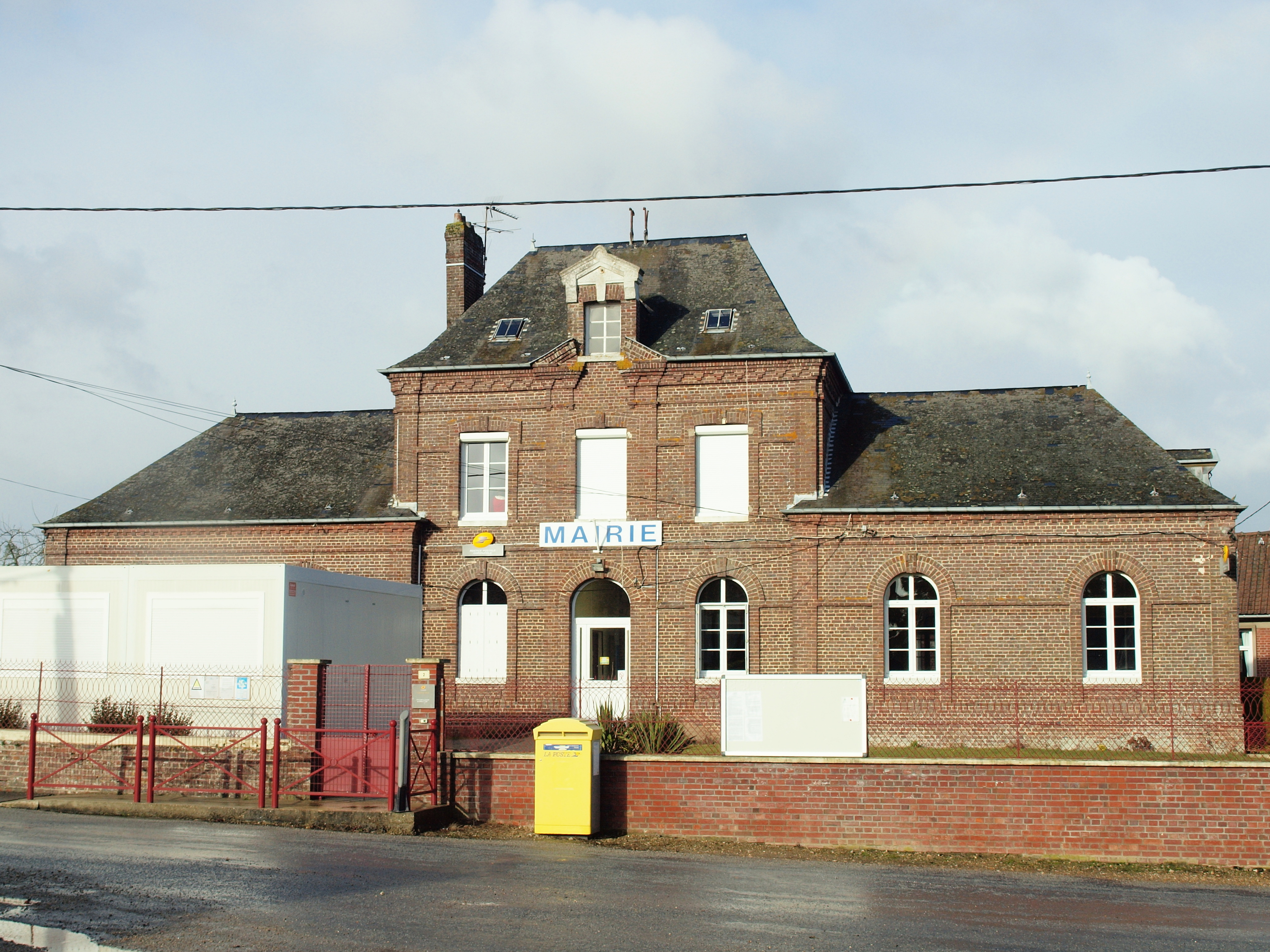 Sommery (Seine-Maritime, France)